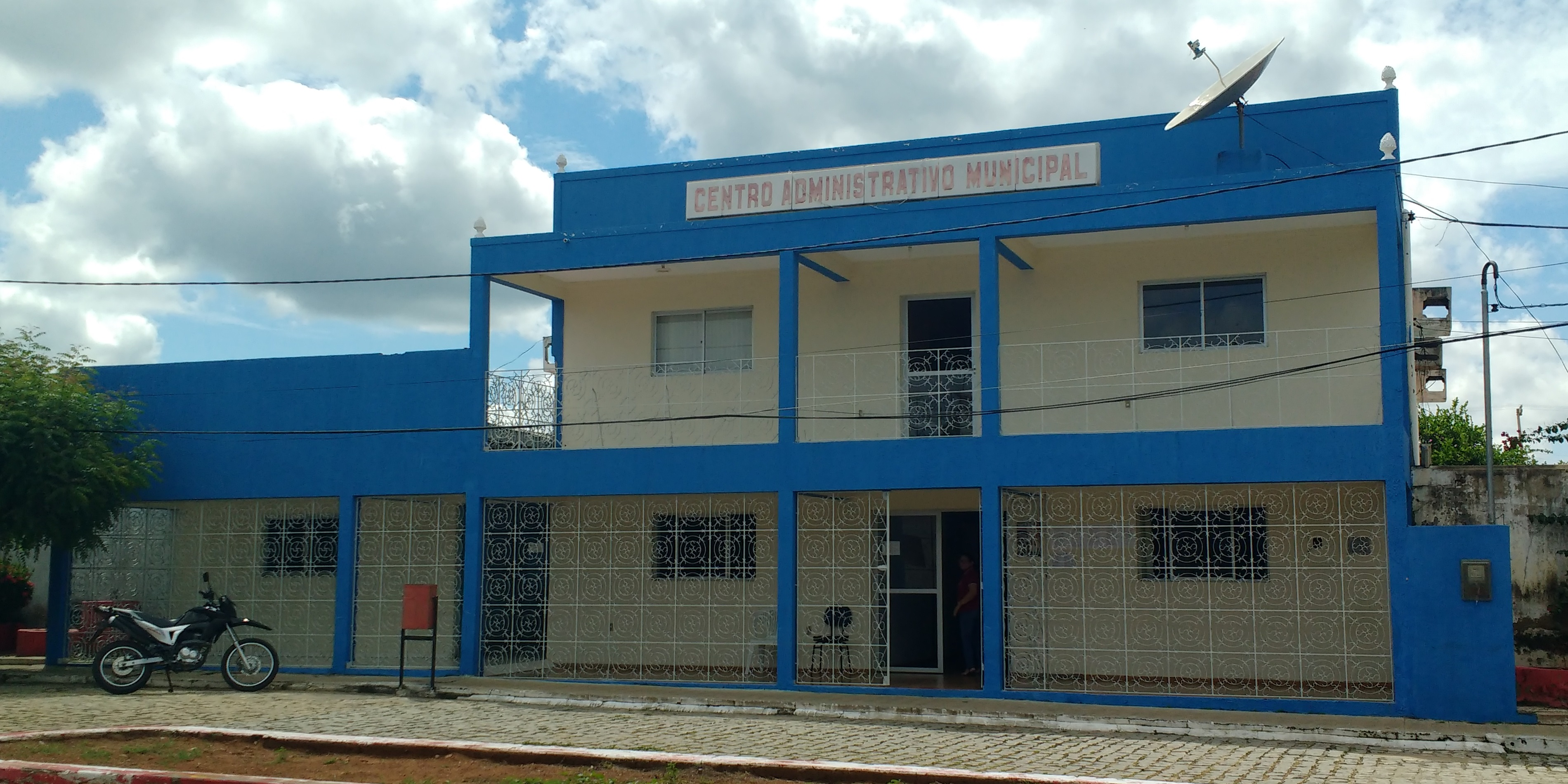 Centro Administrativo Municipal, onde funciona a prefeitura de Lucrécia, Rio Grande do Norte (Brasil)